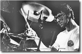 sergio